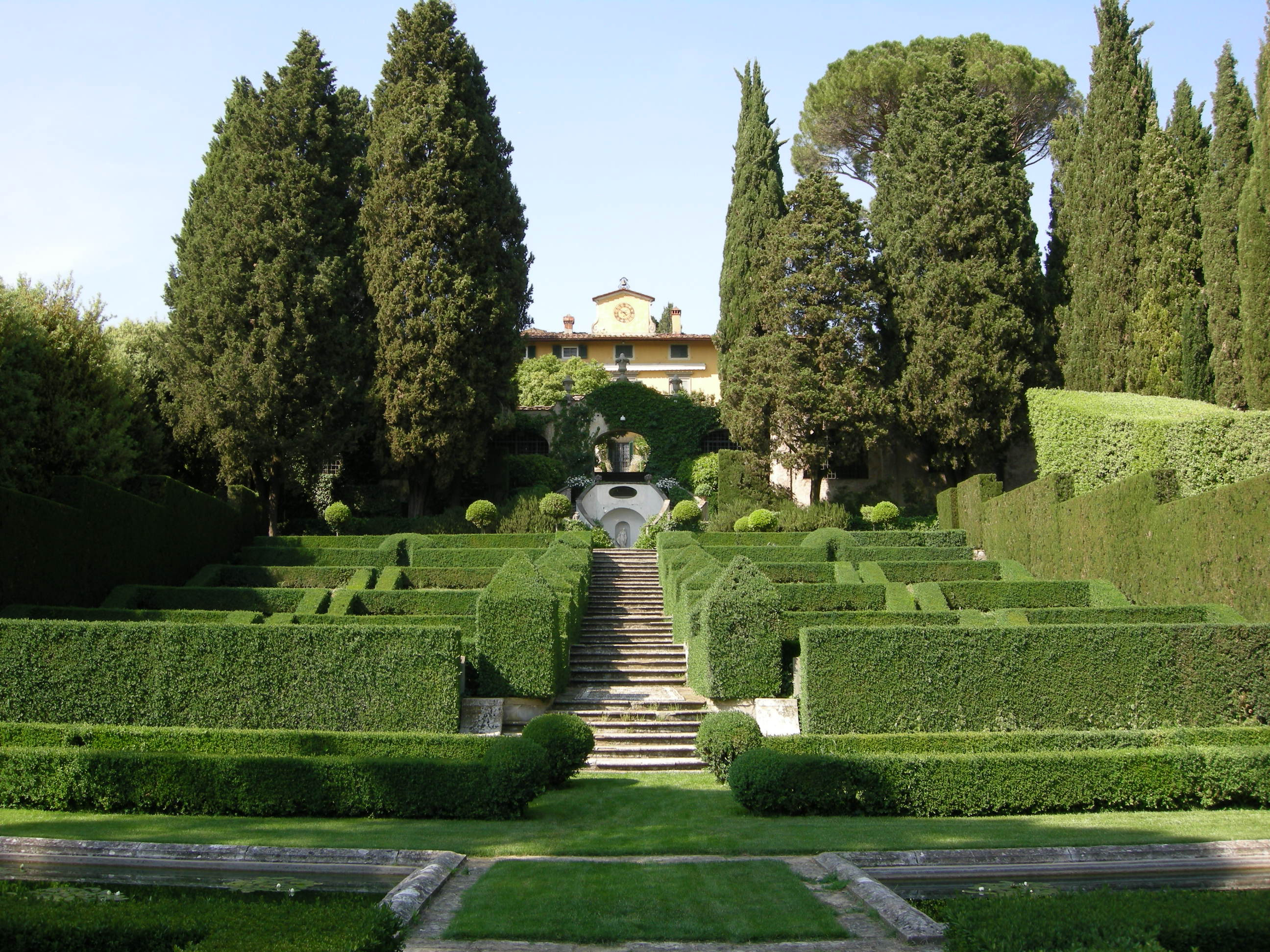 Villa i tatti, giardino all'italiana